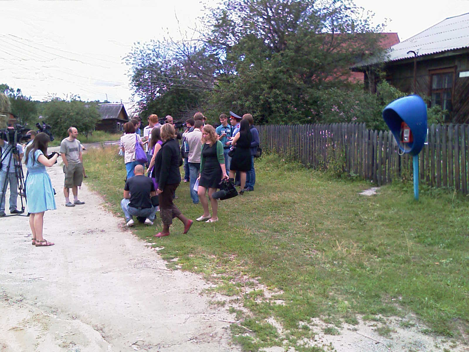 Полиция рассказывает журналистам о состоянии дел в Сагре